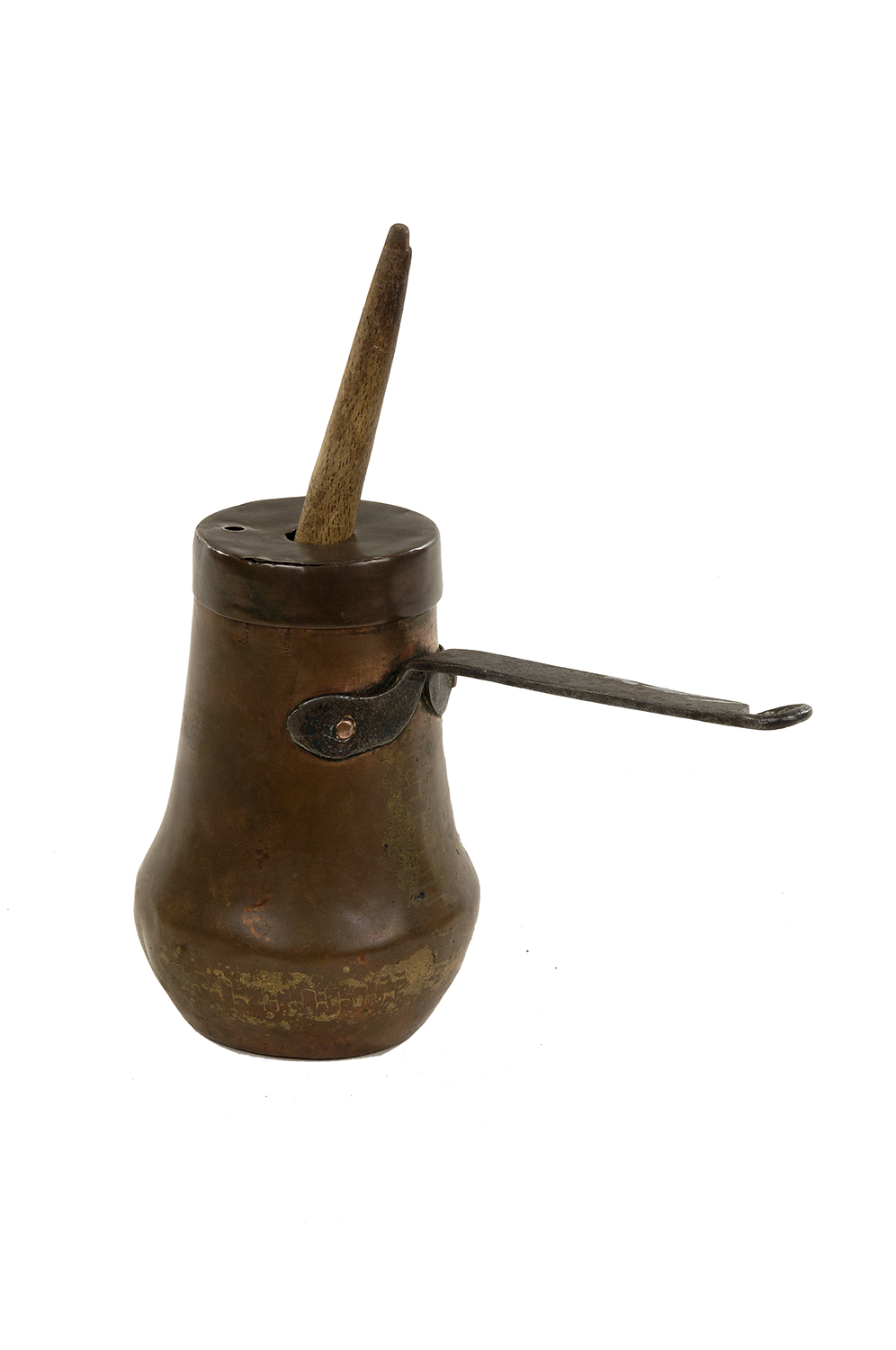 Fotografies dels objectes de l'exposició permanent de la sala "Secà i Muntanya" del Museu Valencià d'Etnologia - Fotografies de Mateo Gamon. Xocolatera. València, segle XX.